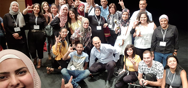 פסטיבל קולנוערבי